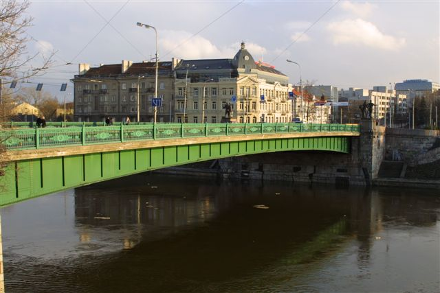 Žaliasis tiltas, Vilnius